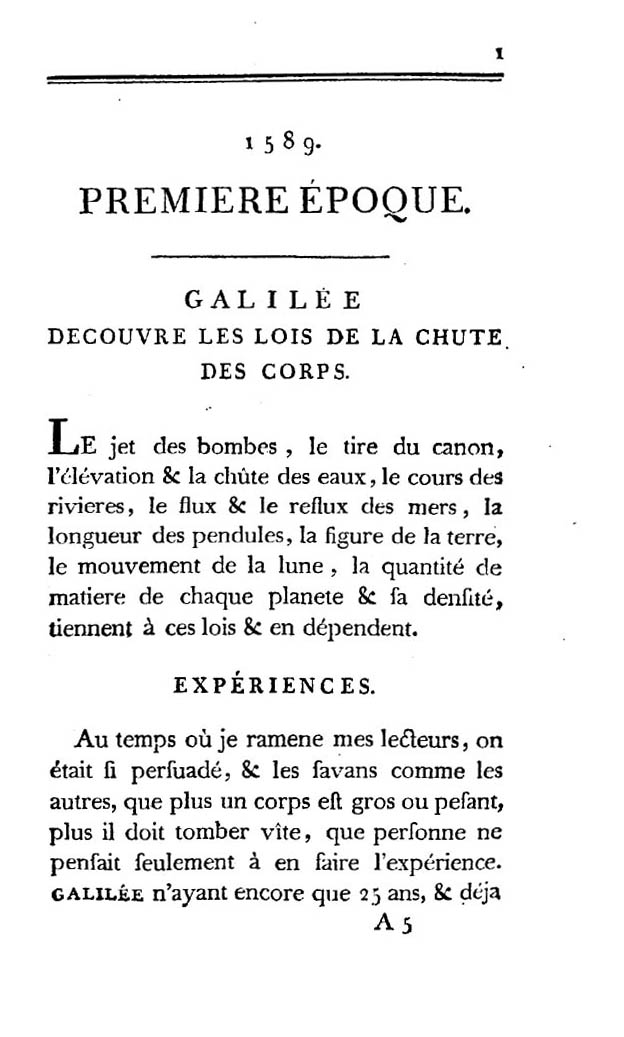 1: Jusqu'à 1662. - A Strasbourg : chez l'Auteur ; et se vend à Paris : chez Lamy Libraire, quai des Augustins, 1786 (A Strasbourg : de l'imprimerie de P. J. Dannbach). - [12], VIII, 332, 46, [2] p. .